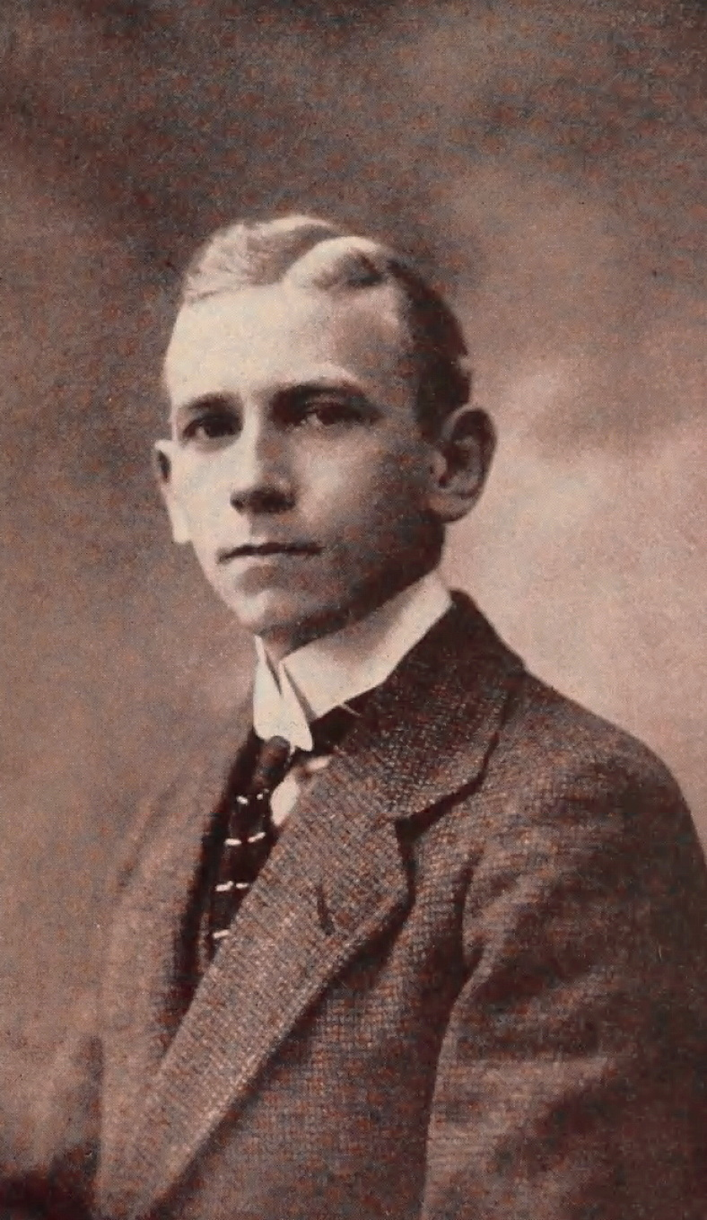 Portræt af forfatteren Ditleff von Zeppelin (1887-1916), hentet fra hans bog Fugletræk.